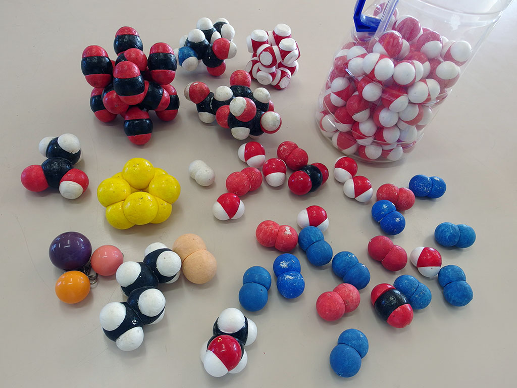 仮説実験授業の授業書〈もしも原子がみえたなら〉等で使用する分子模型。1億倍の窒素分子，酸素分子，水分子など。